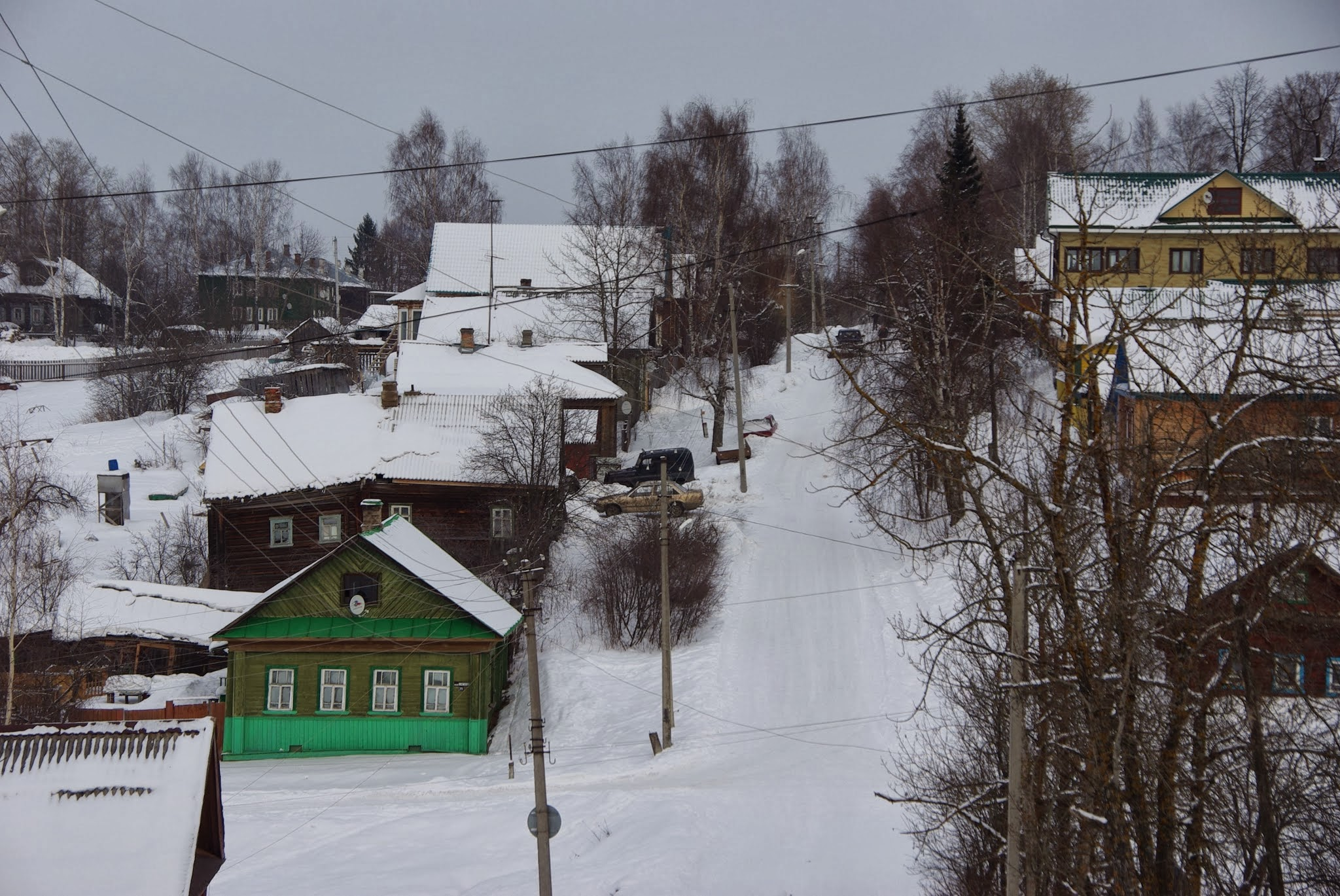 Chukhloma, Kostroma Oblast, Russia, 157130